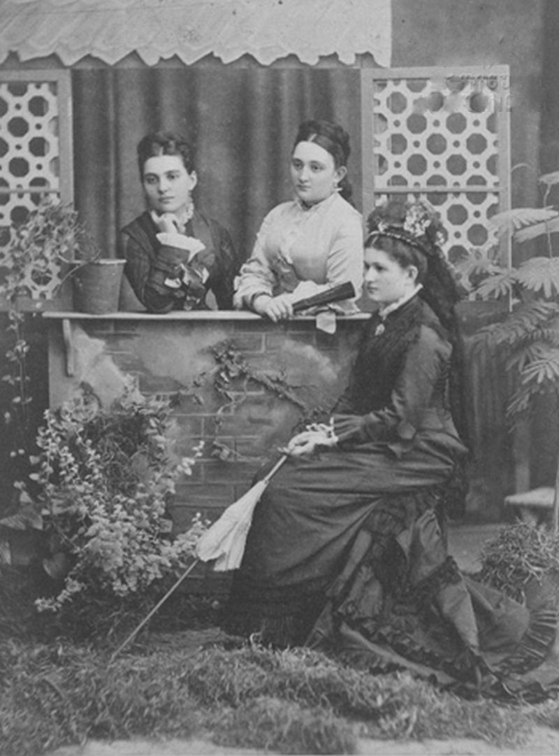 Дочери князя Давида Александровича Чавчавадзе - Тамара (1852-1933), Анастасия (1856-1927) и Елена (1850-1929).